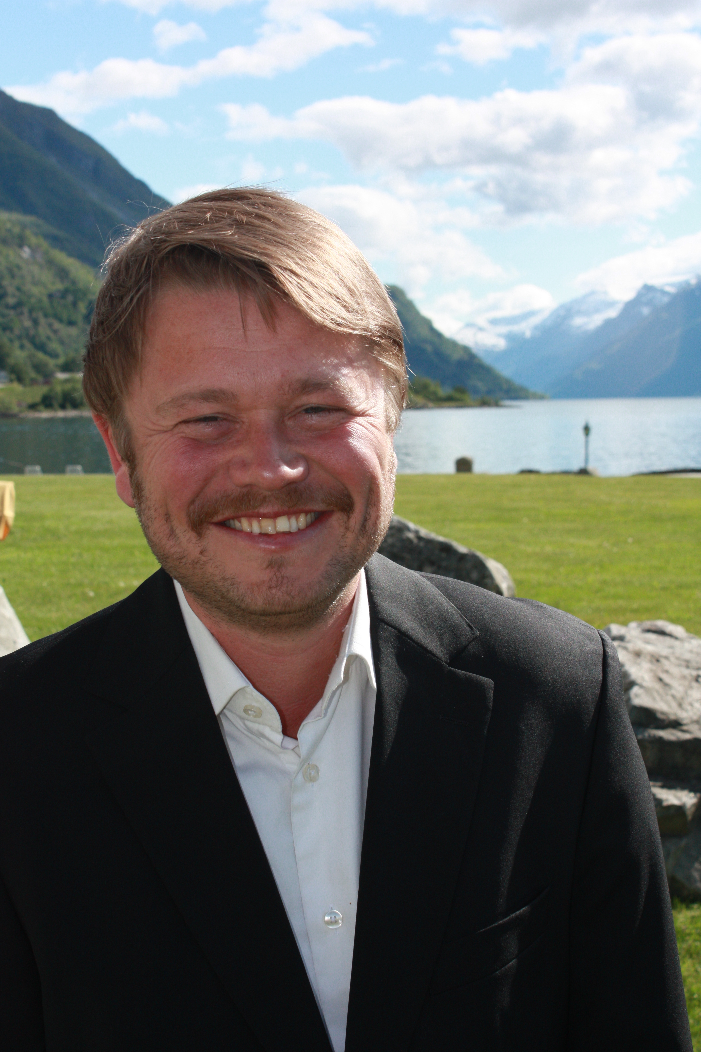 Martin Revheim, Orkestersjef KORK 2008